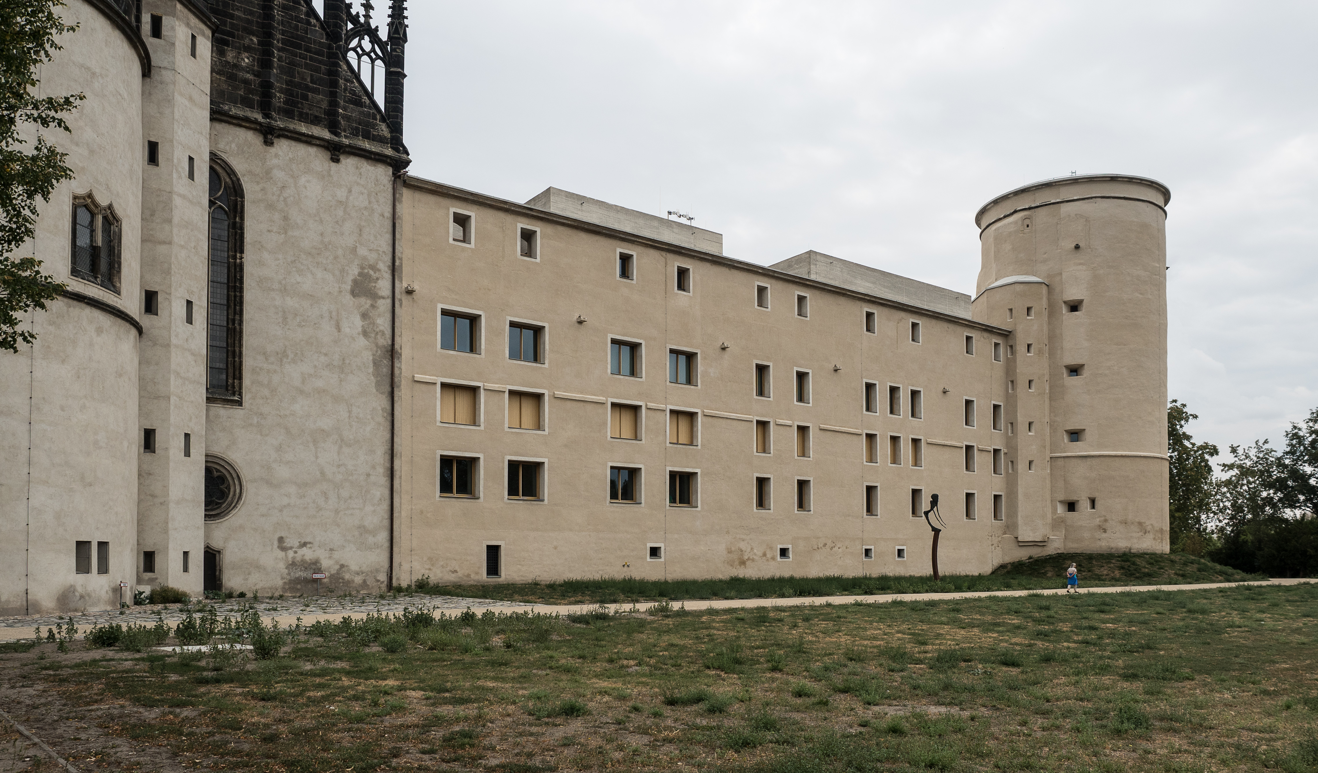 Wittenberger Schloss von Westen nach der Sanierung 2018